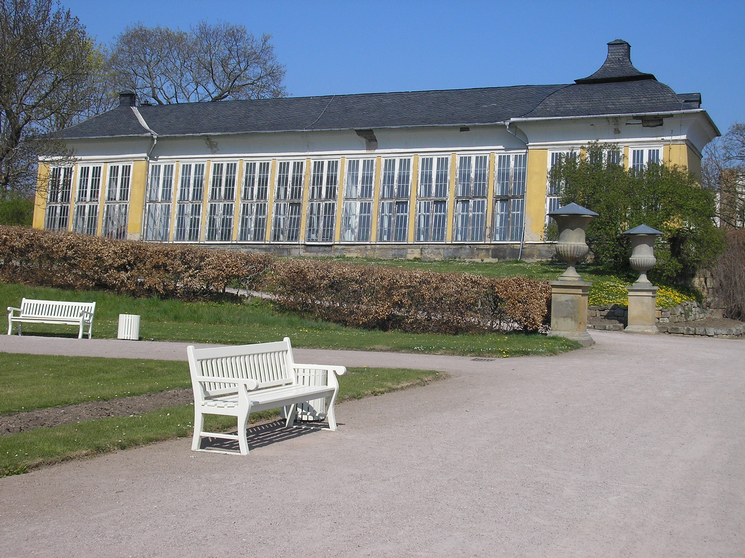 Das Treibhaus der Orangerie in Gotha (Thüringen).